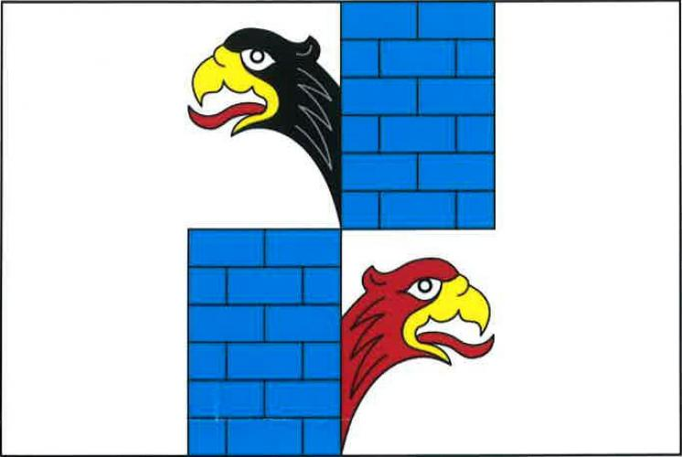 vlajka, ,Chřenovice okres Havlíčkův Brod